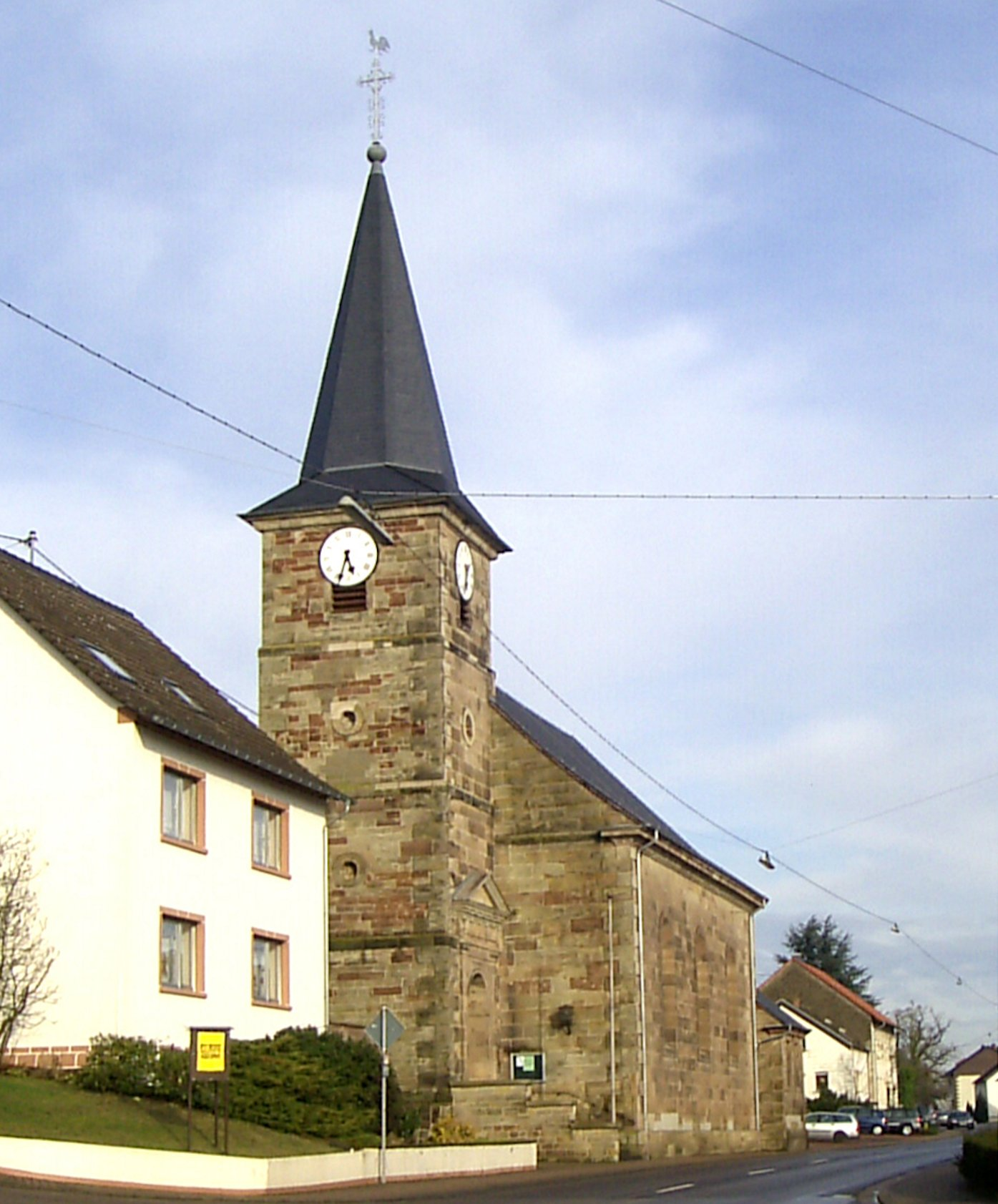 katholische Kirche St. Peter in Bisten